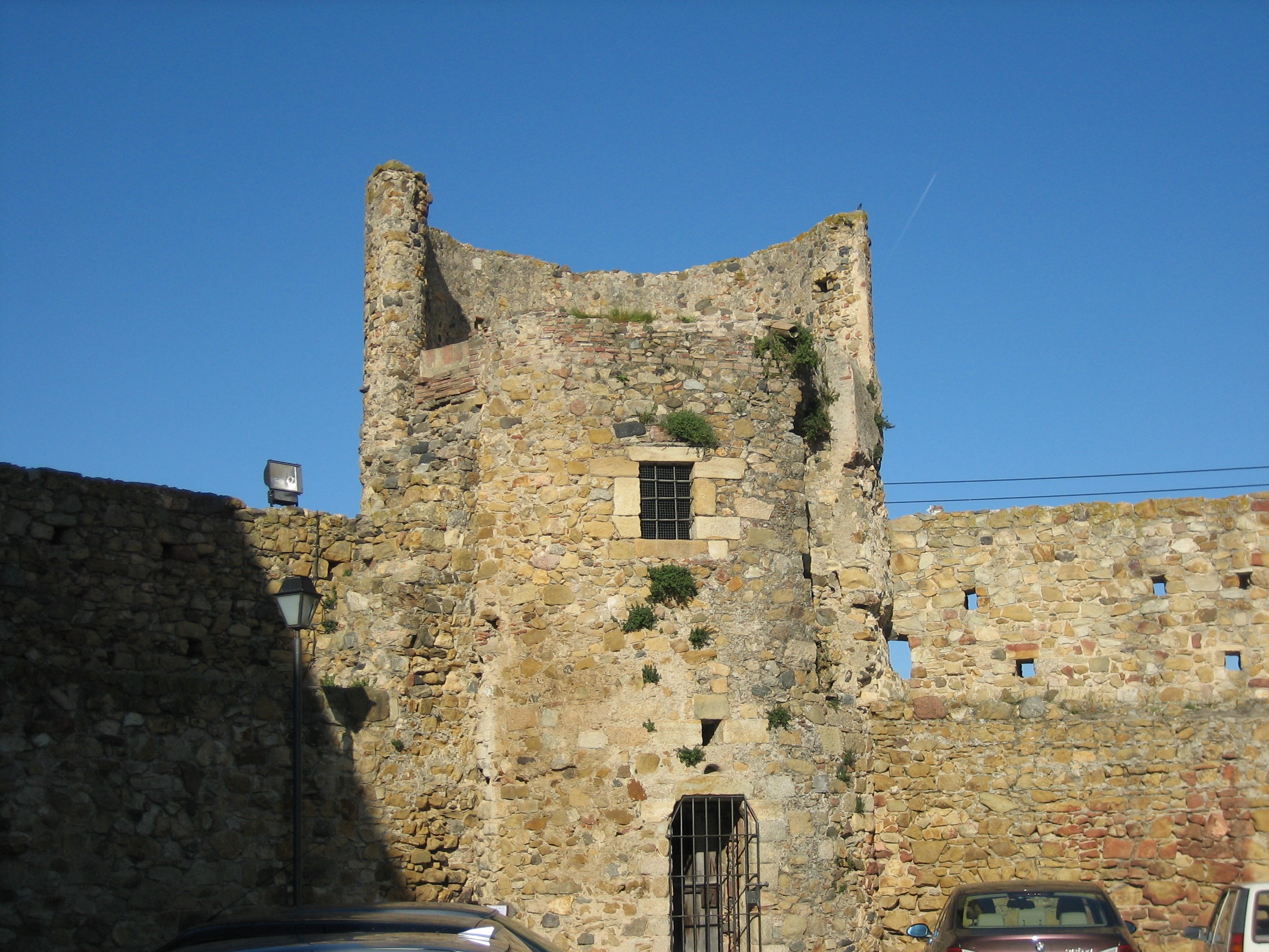 Tros de la muralla de Llagostera